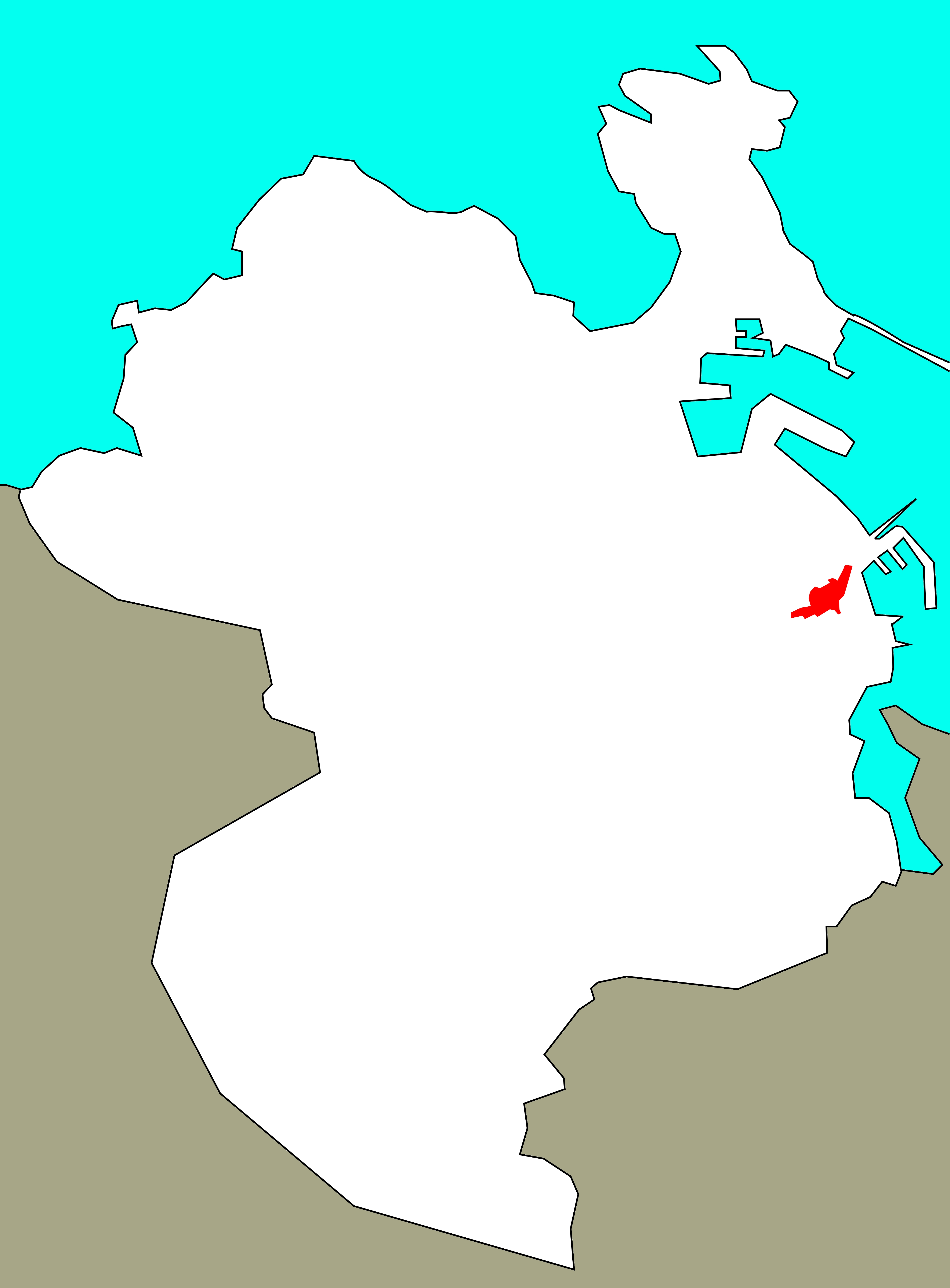 Situación de Casabranca no concello da Coruña, segundo